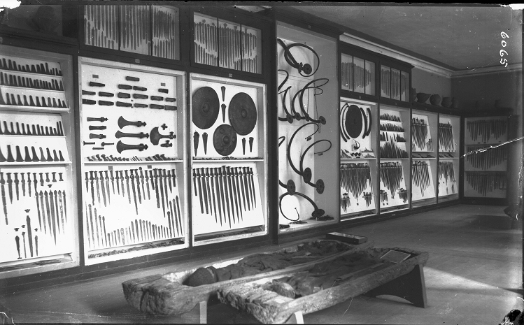 Udstilling i Nationalmuseet - "Museet for nordiske oldsager" fotograferet i 1880érne